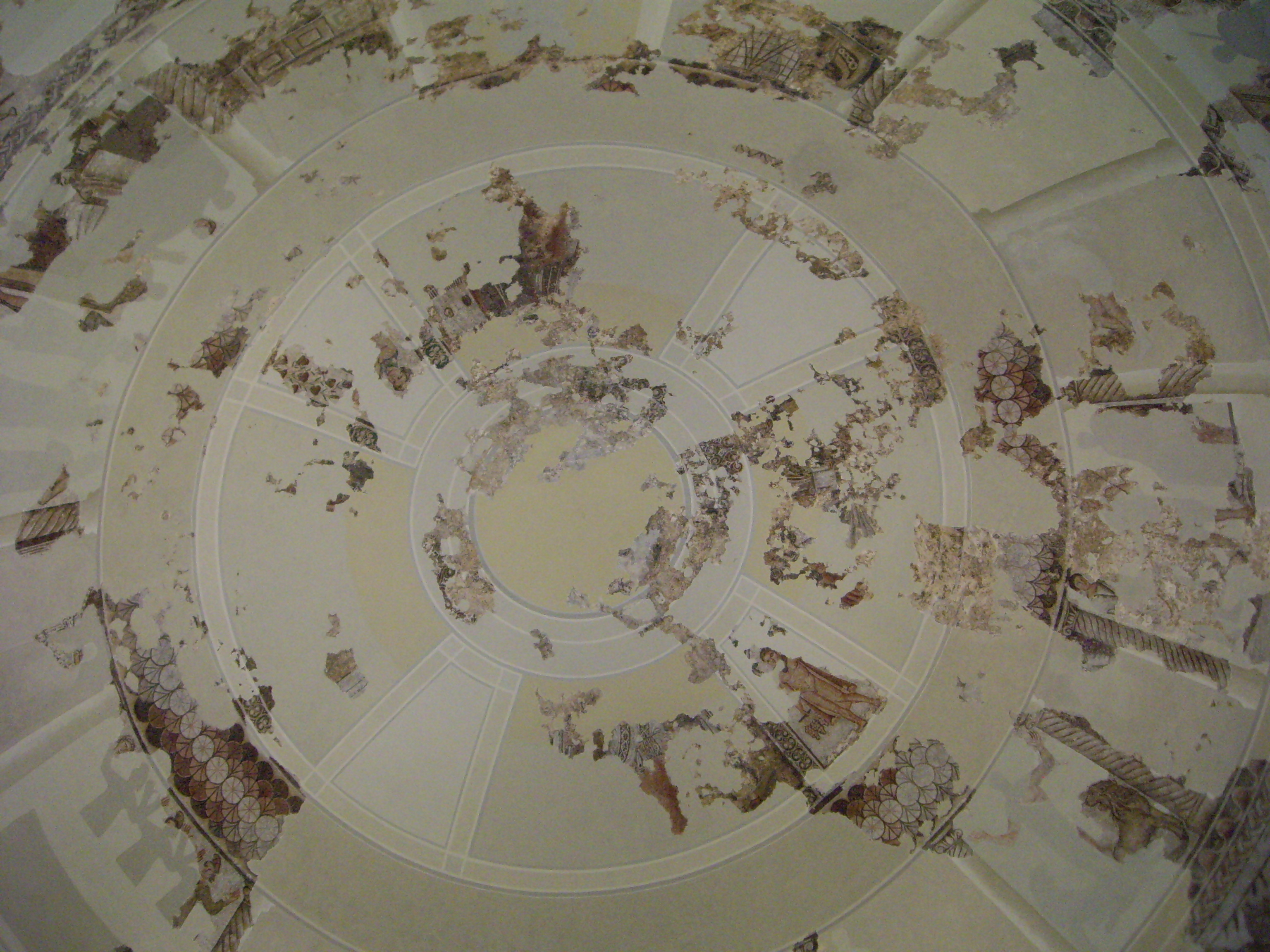 Vista general de la cúpula del Mausoleu de Centcelles, decorada amb mosaics.